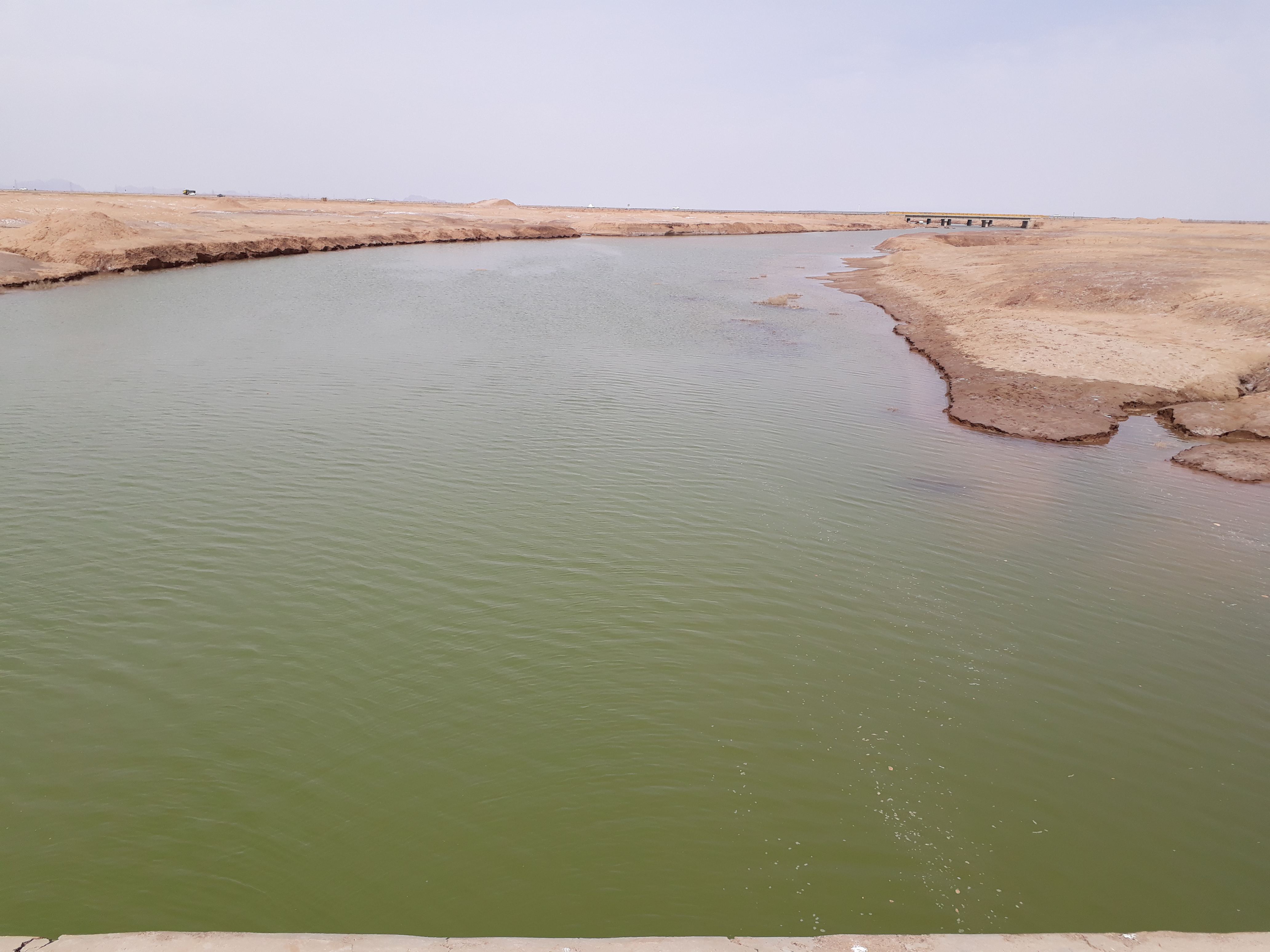 کال شور تربت حیدریه، کویر مرکزی ایران